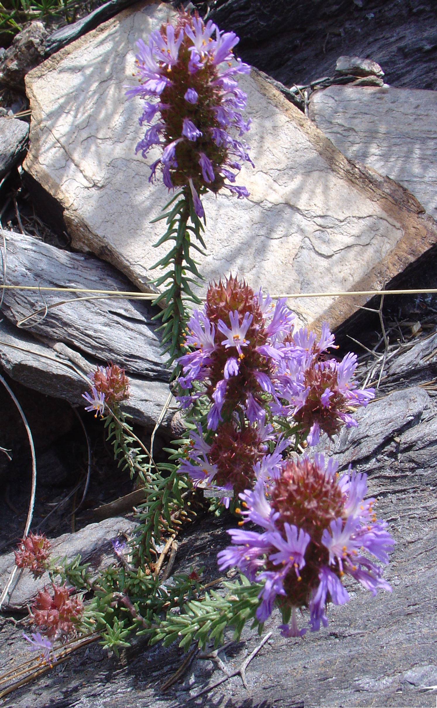 Coris monspeliensis from Calblanque, Murcia, Spain